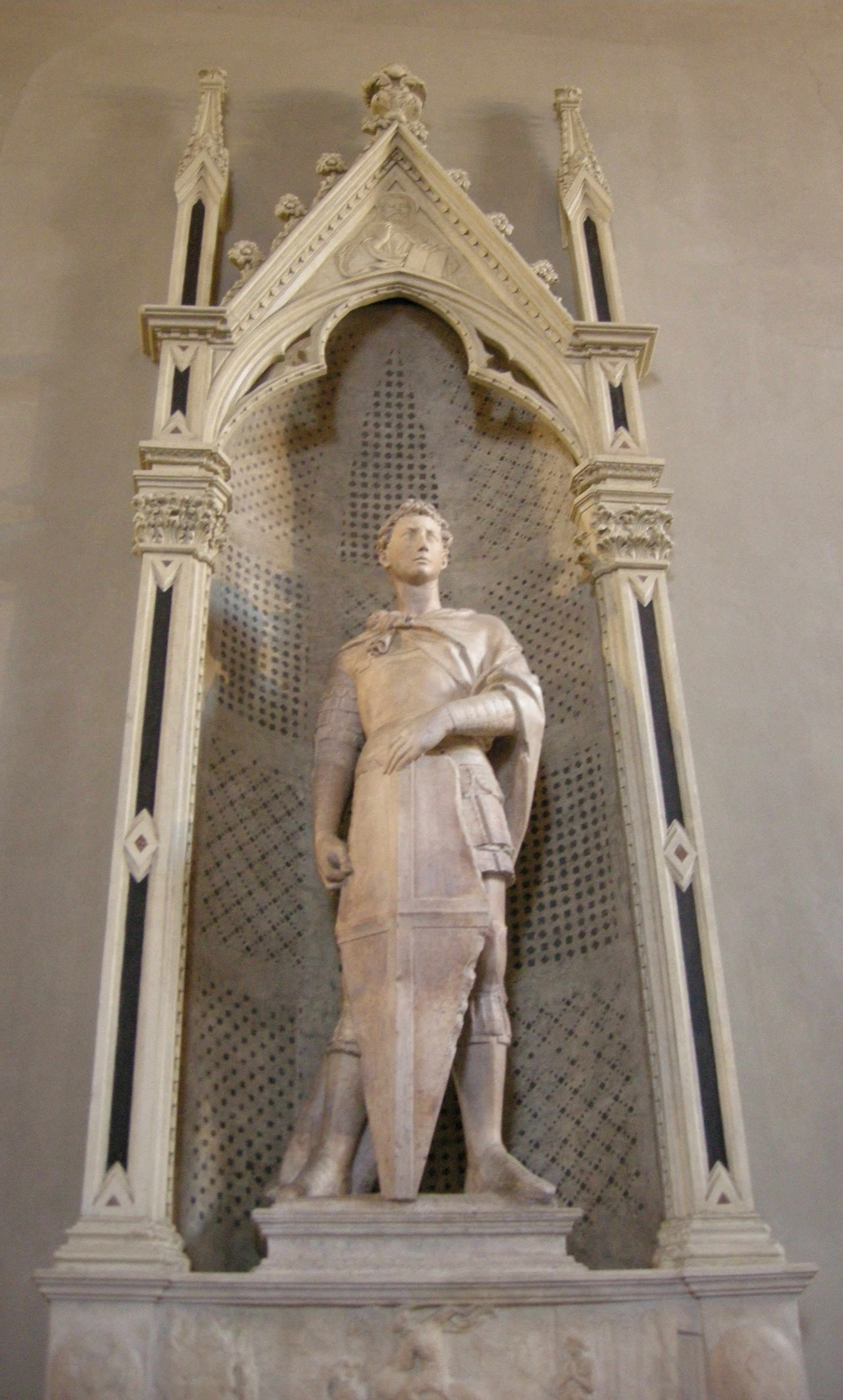 Donatello, san giorgio